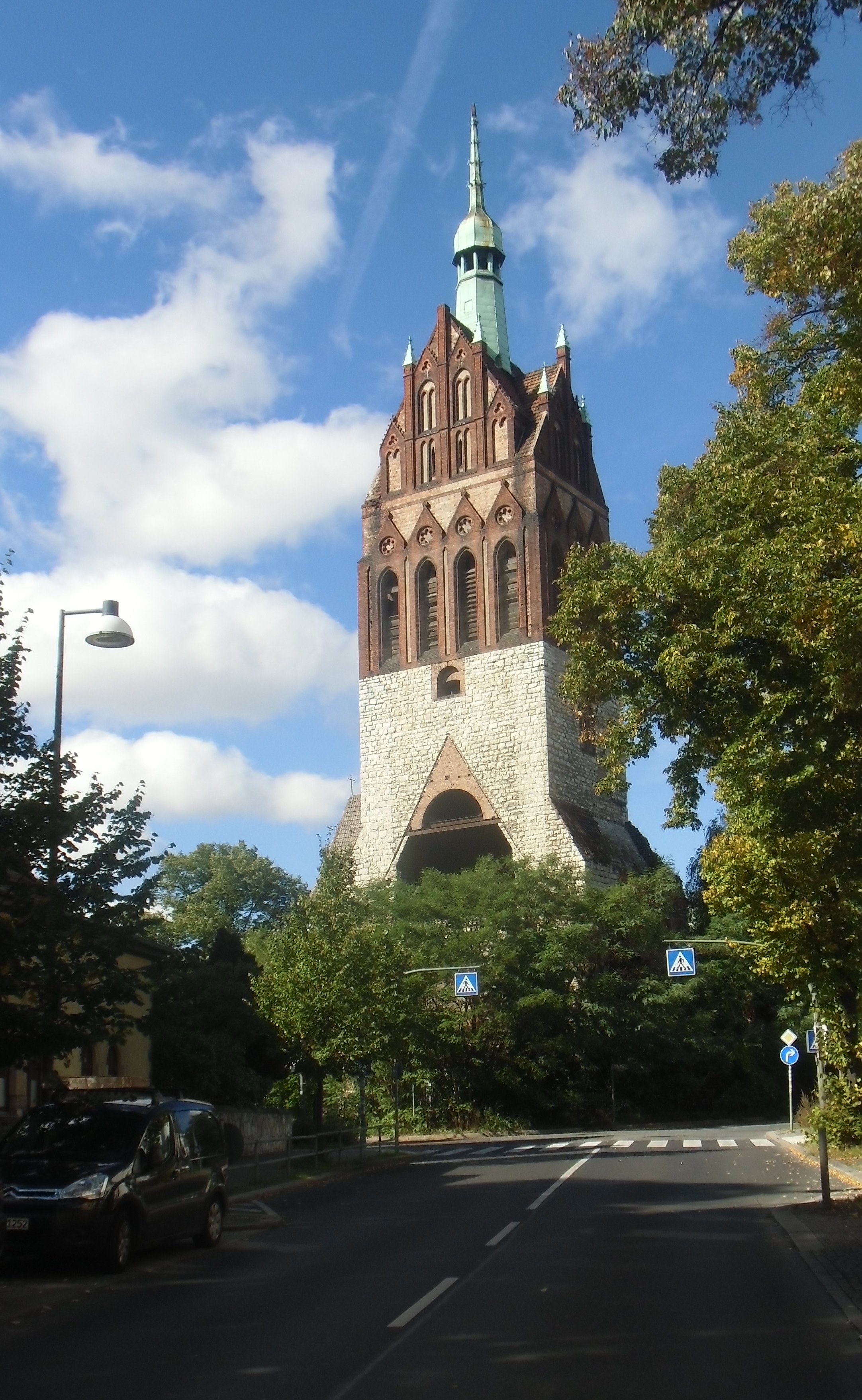 Denkmalgeschützter Turm der Bethanienkirche am Mirbachplatz von der Pistoriusstraße, erbaut 1900-1902